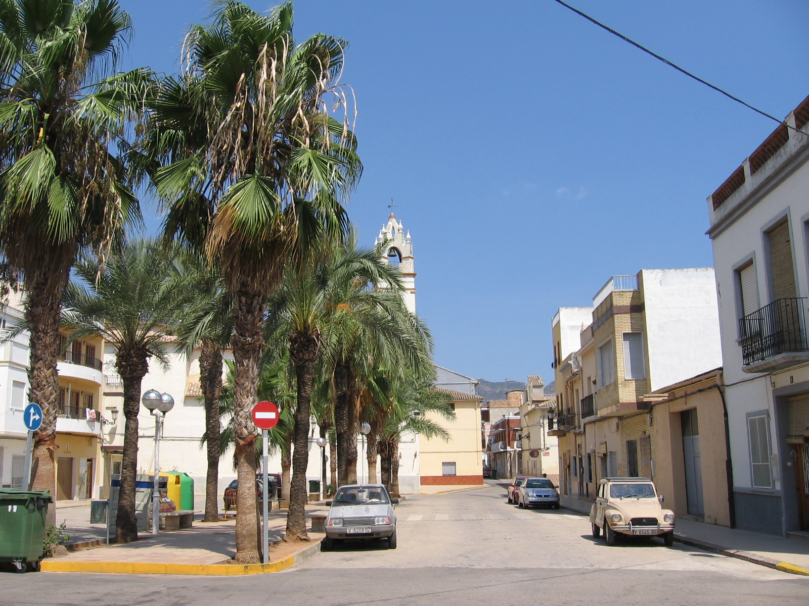 Benifairó de la Valldigna (Valencia)